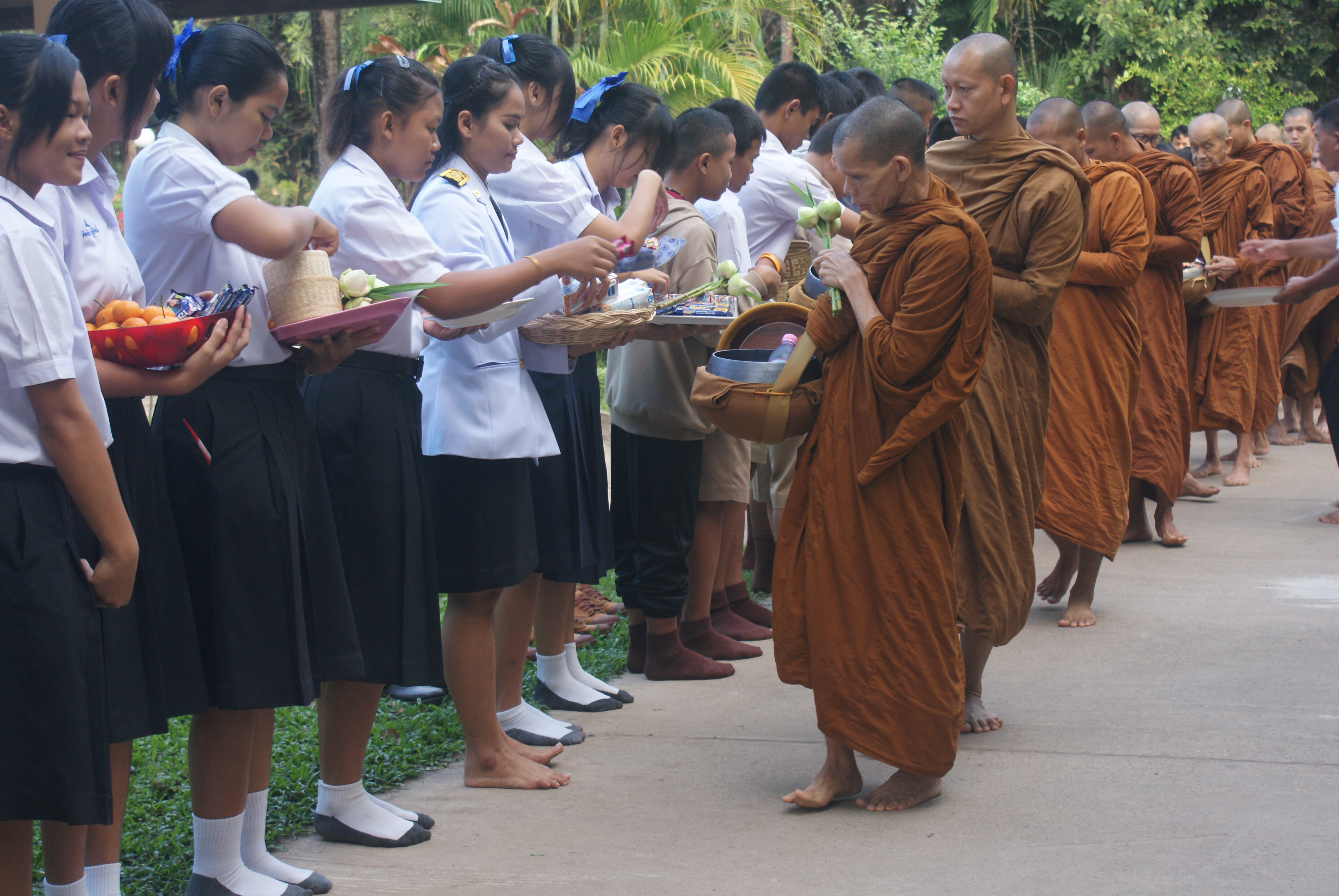 ทำบุญ